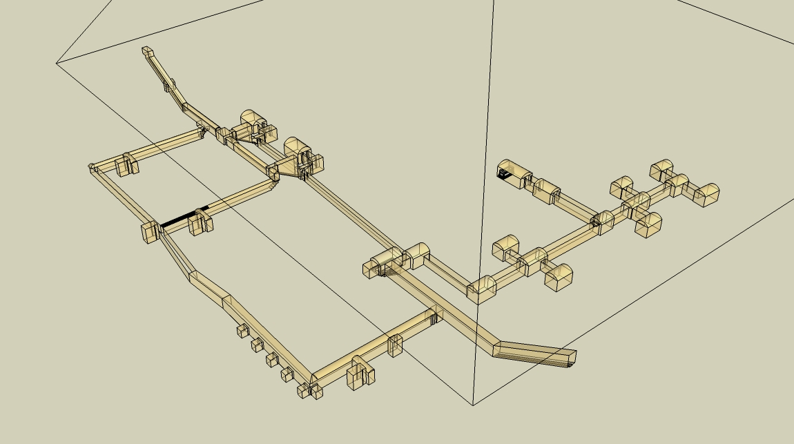 restitution du complexe funéraire d'amenemhat III à Dahchour, appartements funéraires